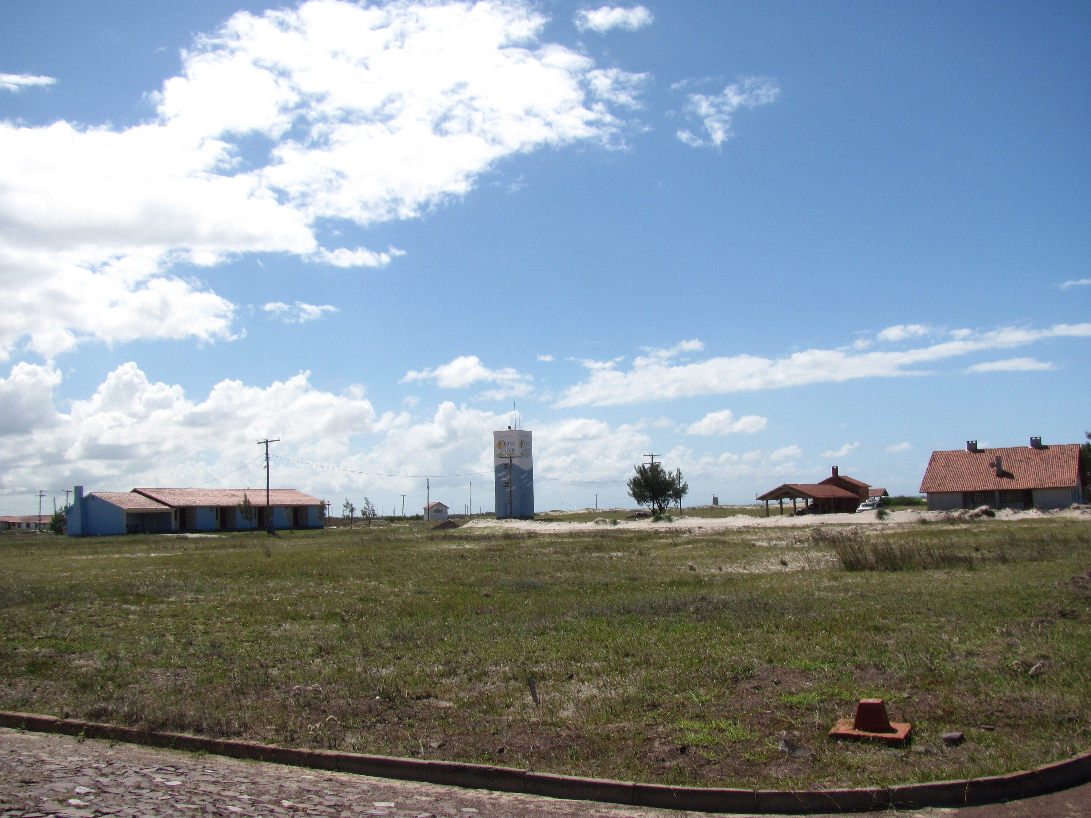 Construção de condominio em Dunas Altas